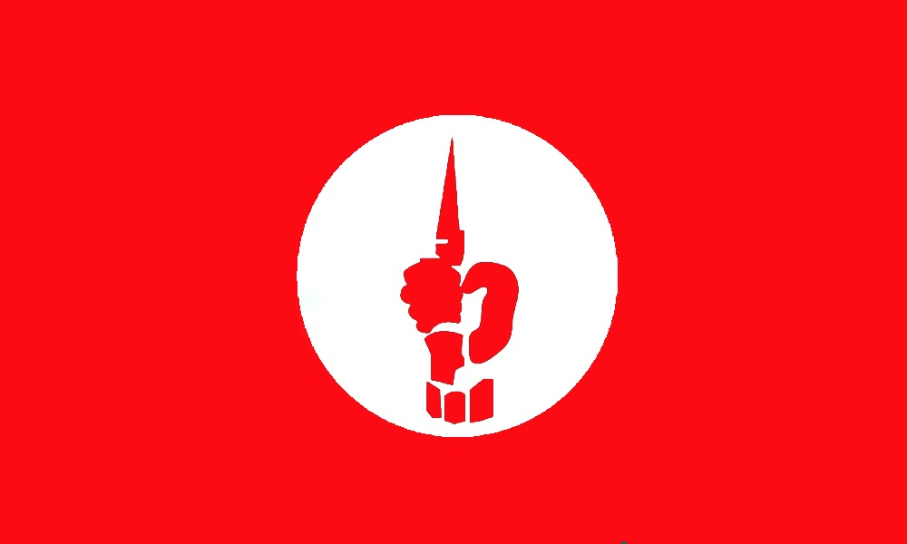 ১৯৭১ সালের বাংলাদেশ স্বাধীনতা যুদ্ধের সময়কালে মুক্তিবাহিনীর পতাকা।